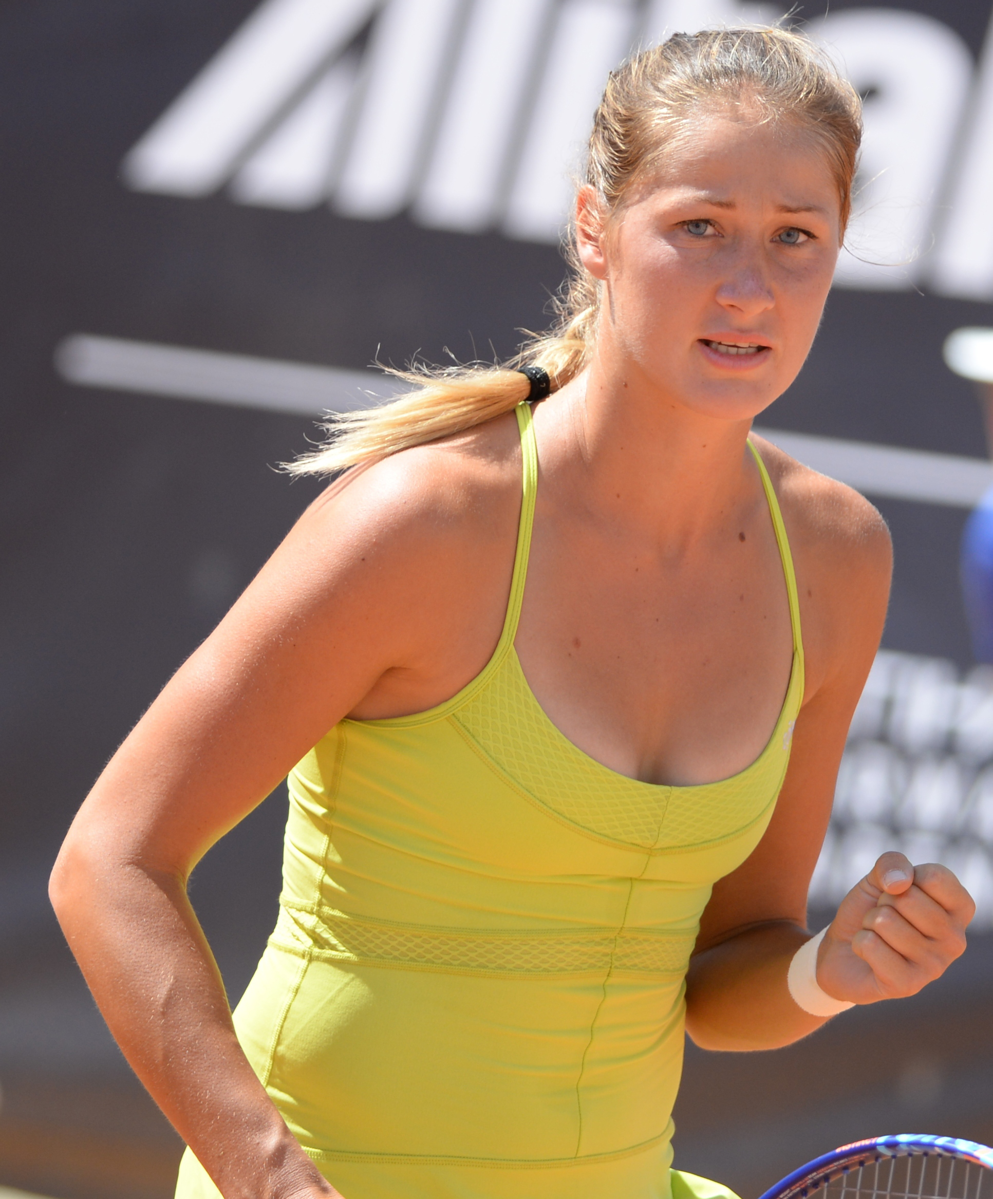 Bojana Jovanovski